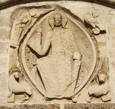 Cervon, ancienne collégiale Saint-Eptade, Tympan